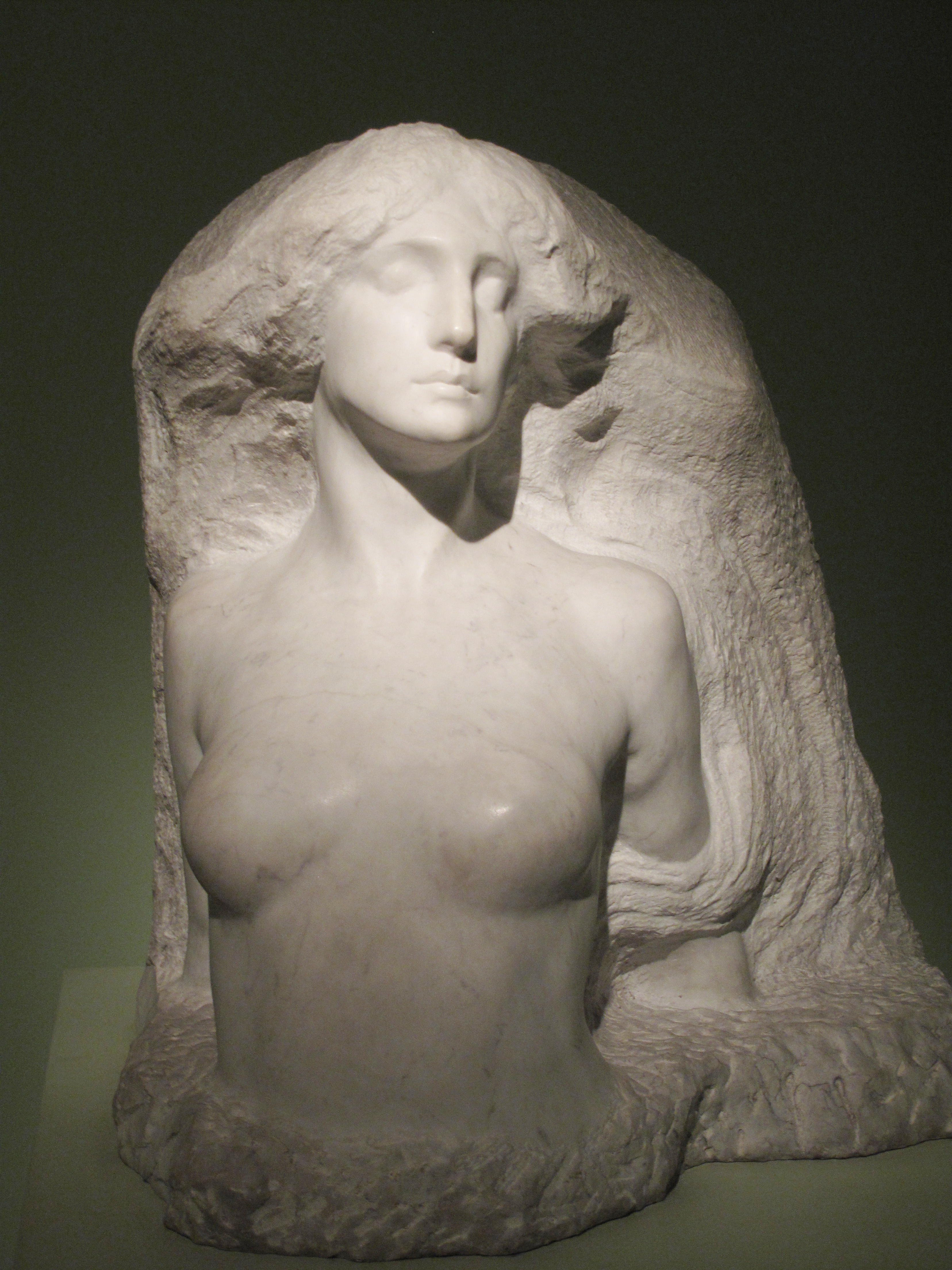 Escultura de Leonardo Bistolfi sobre mármol 83 x 75,5 x 50 cm. En Museo Nacional de Bellas Artes, Buenos aires.